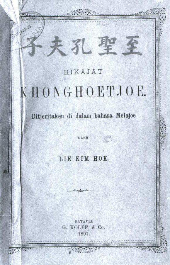 Book cover for Hikajat Khonghoetjoe